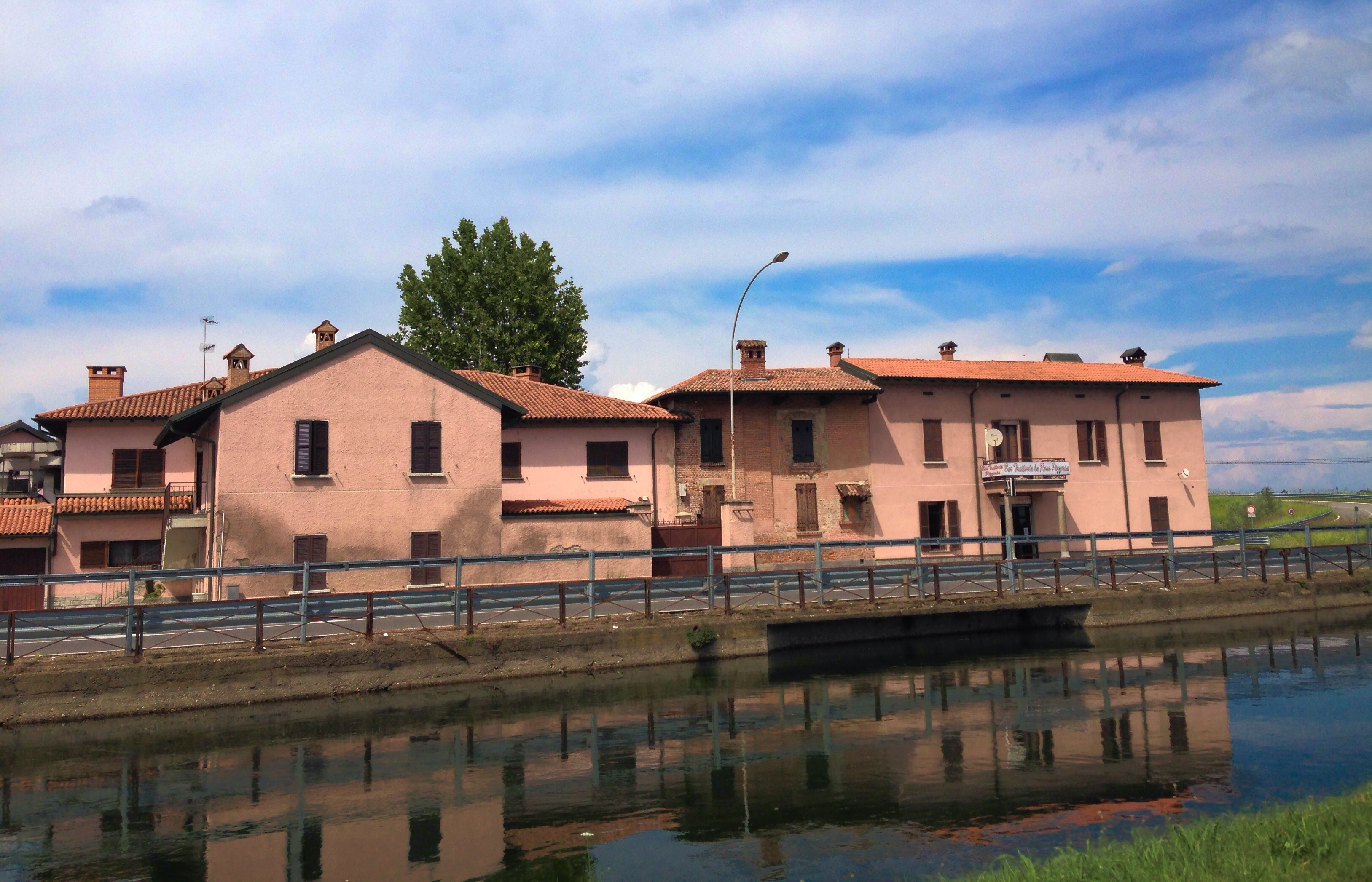 Gaggiano - SS494 Cascina Rosa